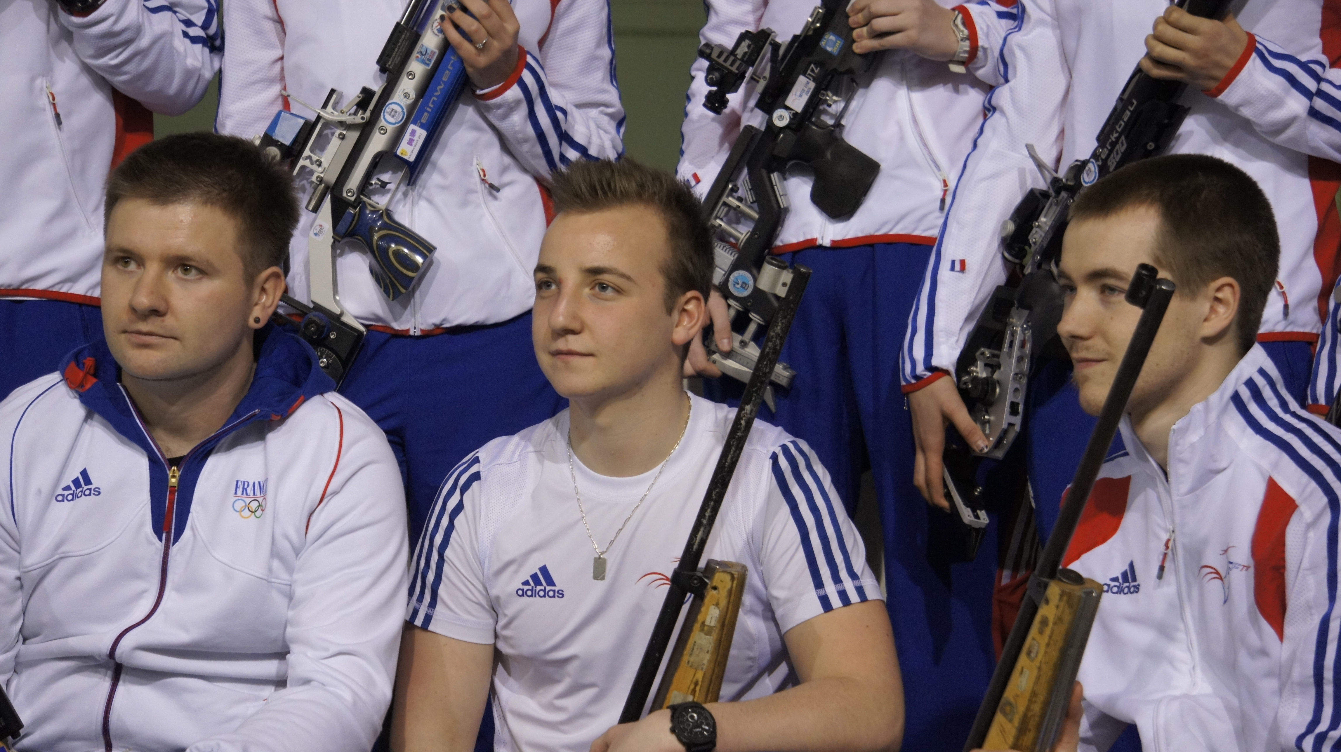 Piasecki Raynaud et Monnier au Championnat de France 2013 à Reims .